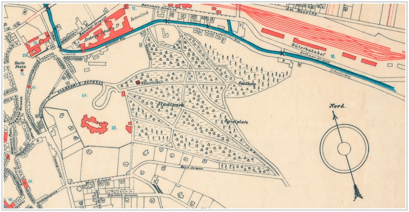 Ausschnitt der Karte mit dem Bereich Stadtpark von Eisenach